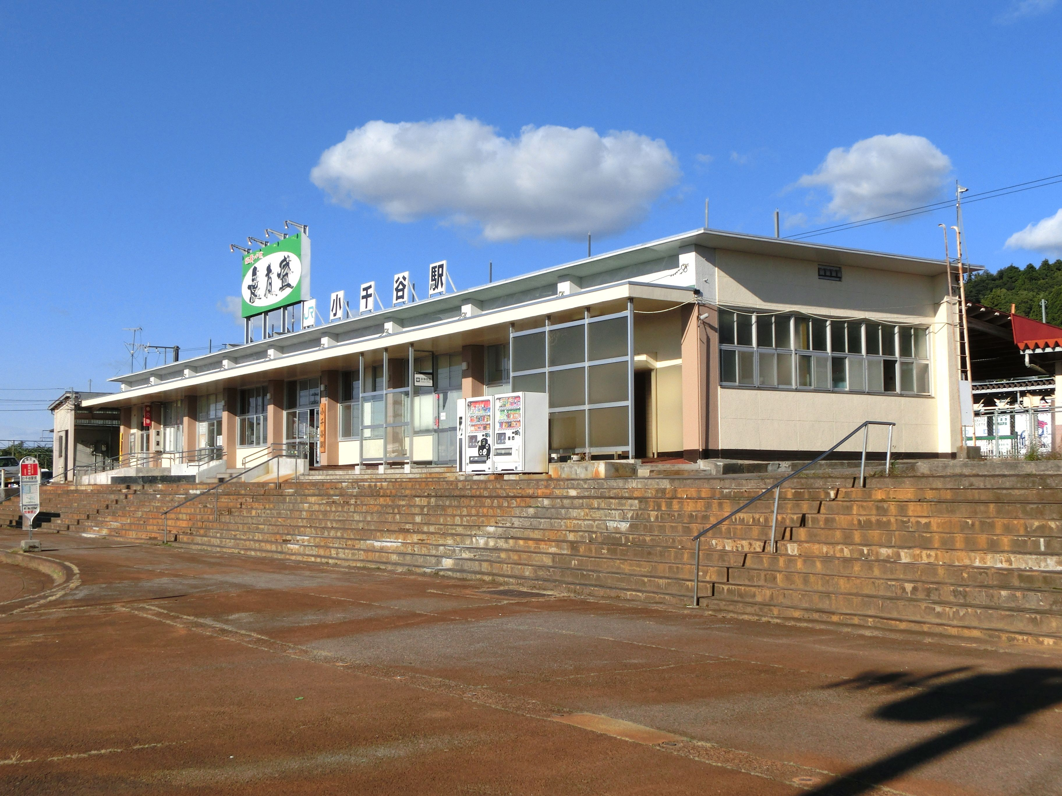 JR東日本上越線 小千谷駅